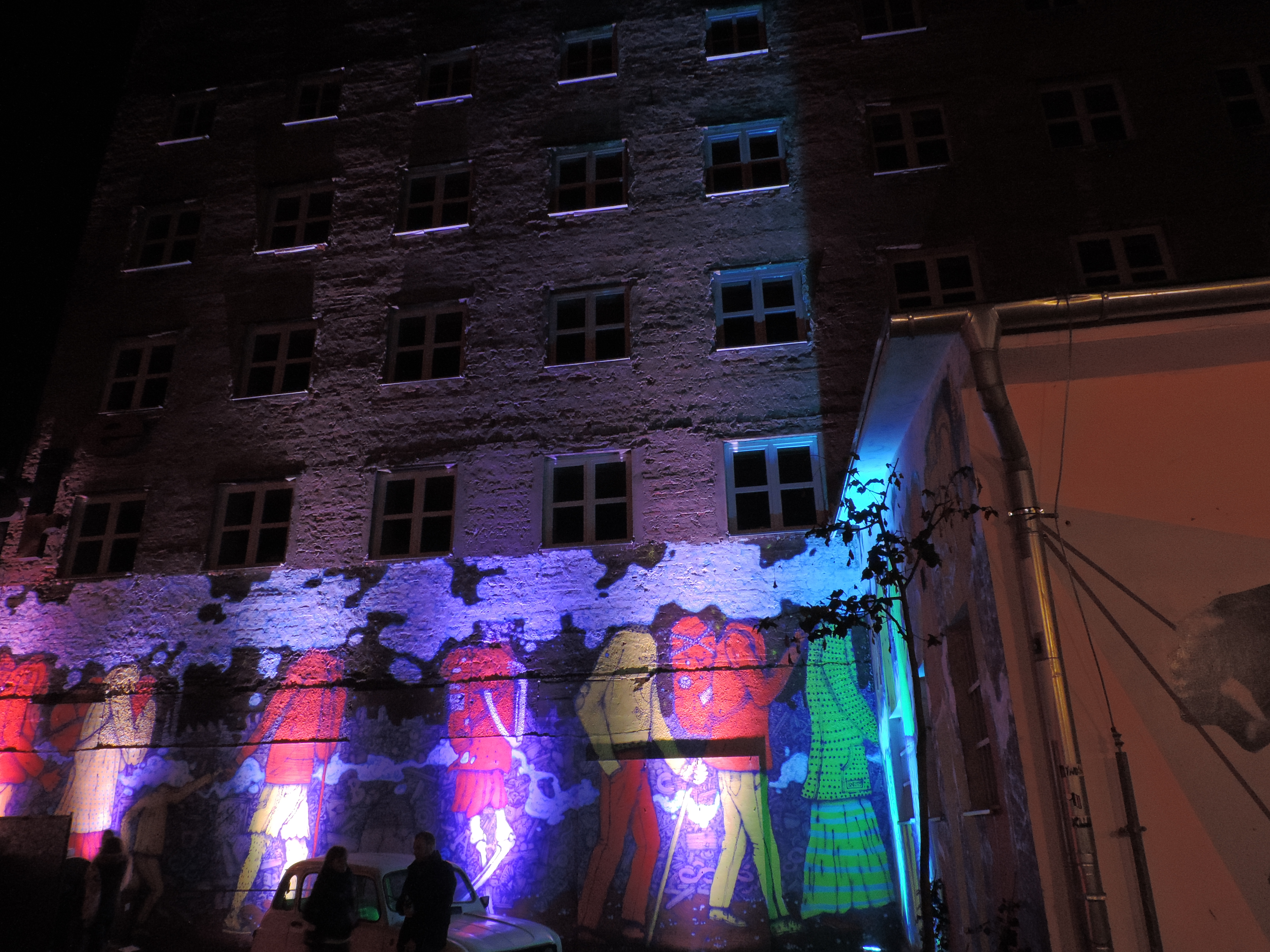 Tabačka Kulturfabrik